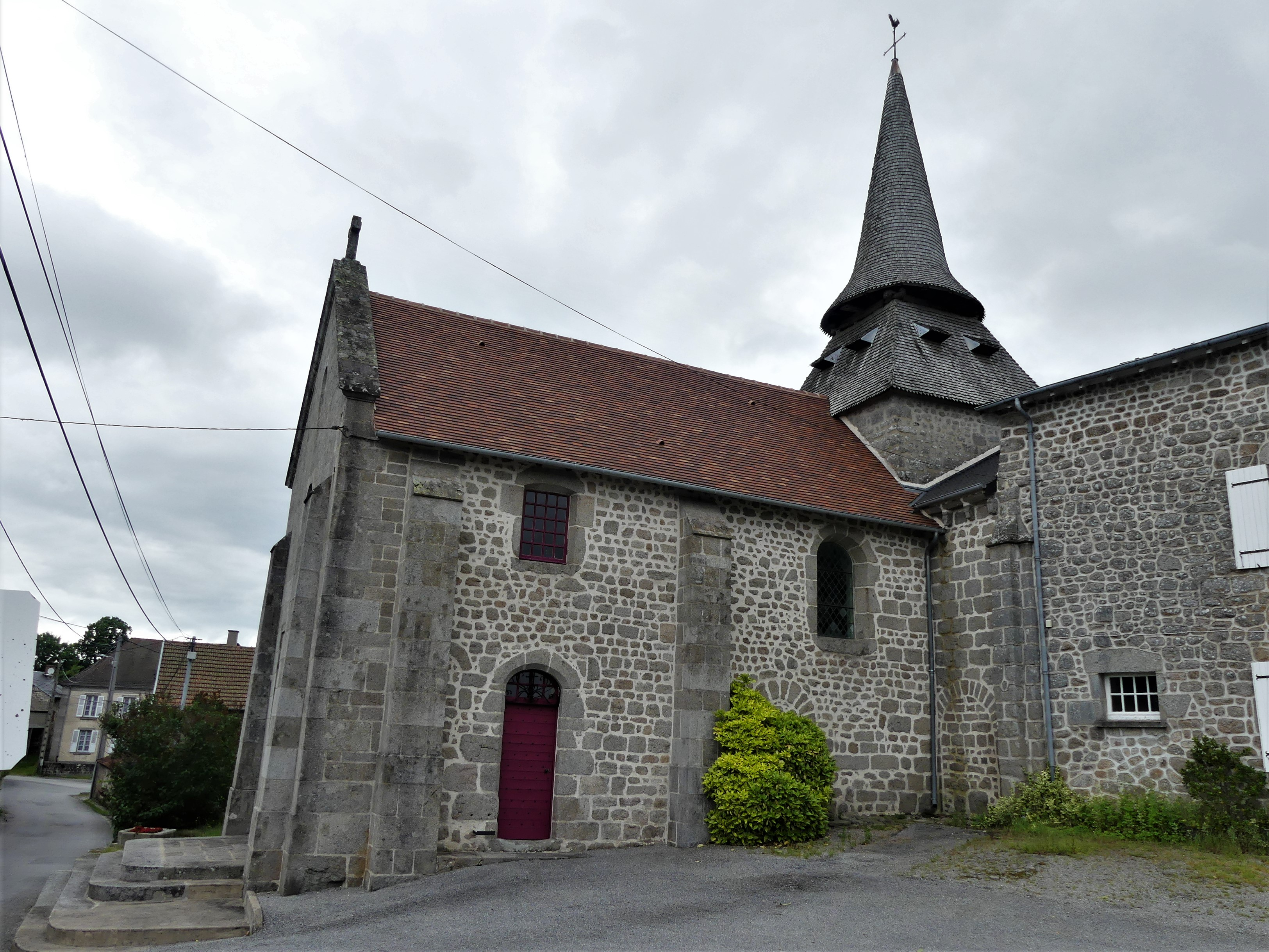 L'église de Saint-Alpinien, Creuse, France.